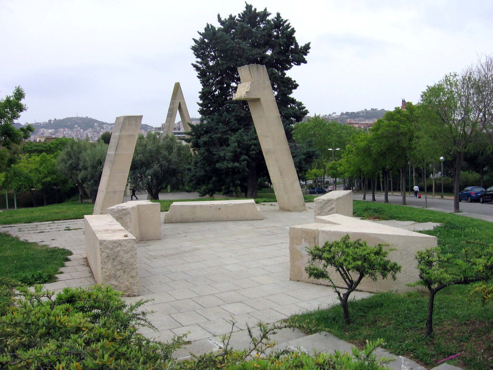 Poema visual transitable en tres temps (Joan Brossa)